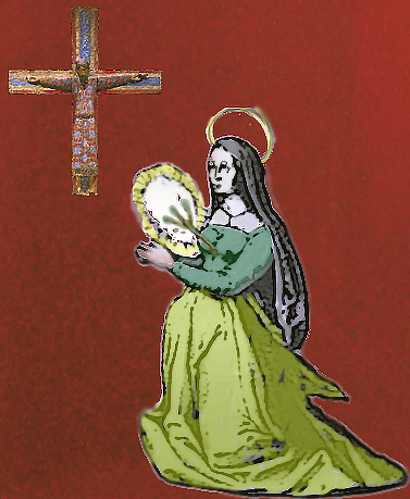 Ortolana de Asís embarazada rezando ante el crucificado con una rama y tres vástagos saliendo de su vientre